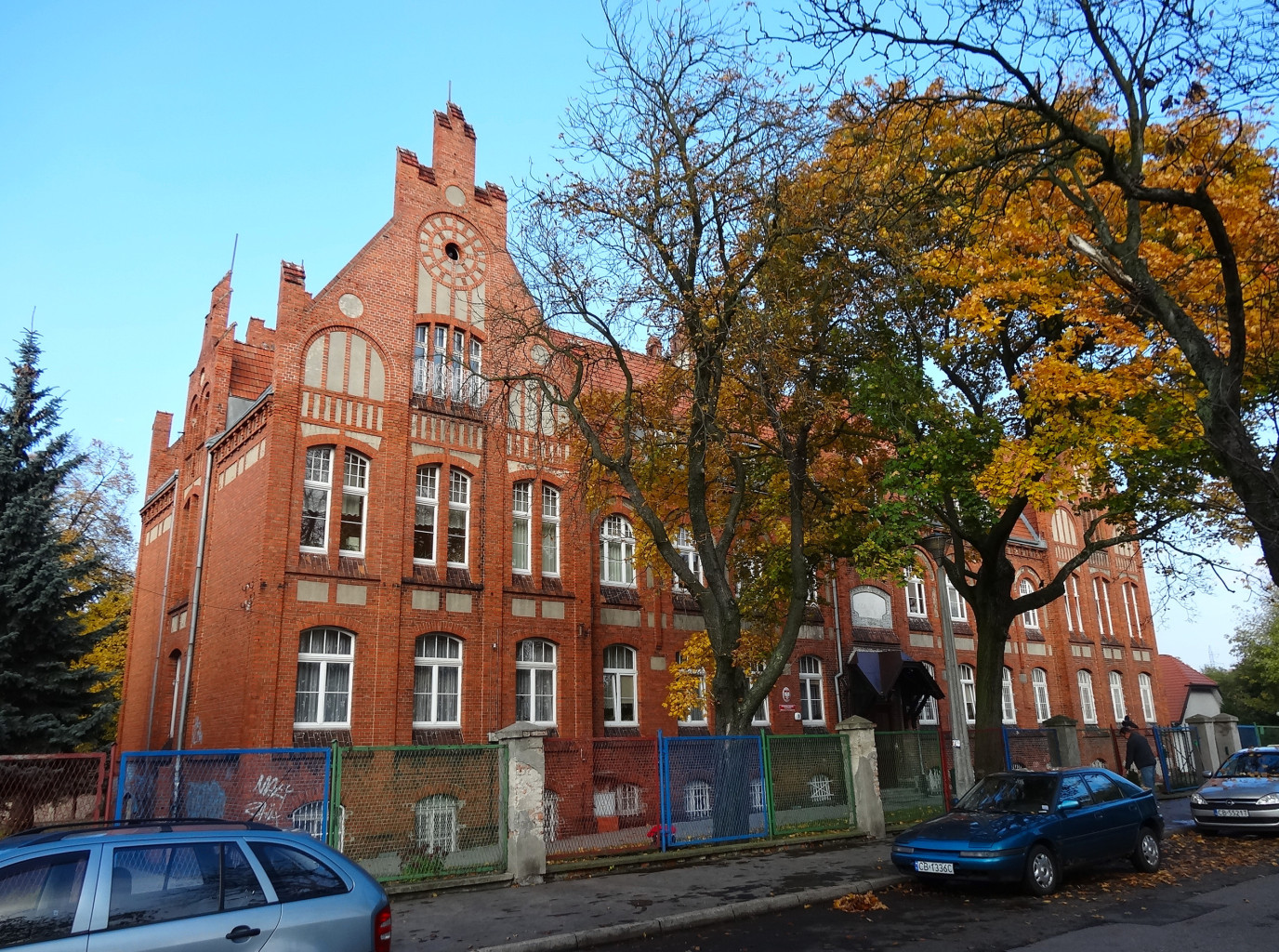 Bydgoski Zespół Placówek Opiekuńczo-Wychowawczych, ul. Traugutta 5 (1905-07, Carl Meyer), dawniej sierociniec miejski fundacji Hermanna Dietza